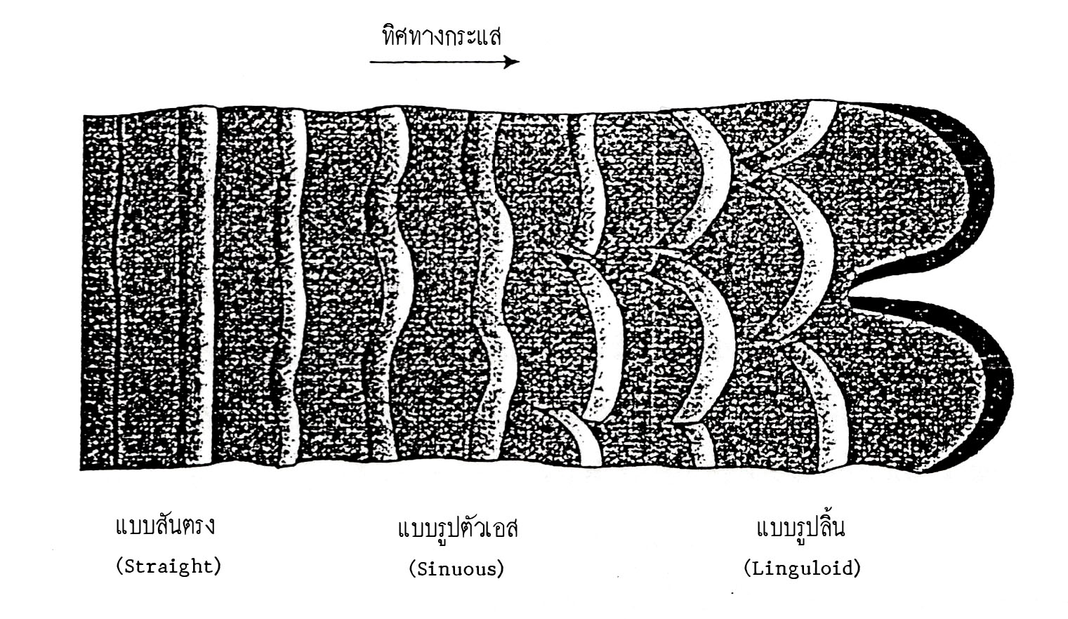 ลักษณะของรอยริ้วสันตรงที่เปลื่ยนรูปร่างเมื่อมีกระแสเร็วมากขึ้นเป็นรูปตัวเอสและรูปลิ้น